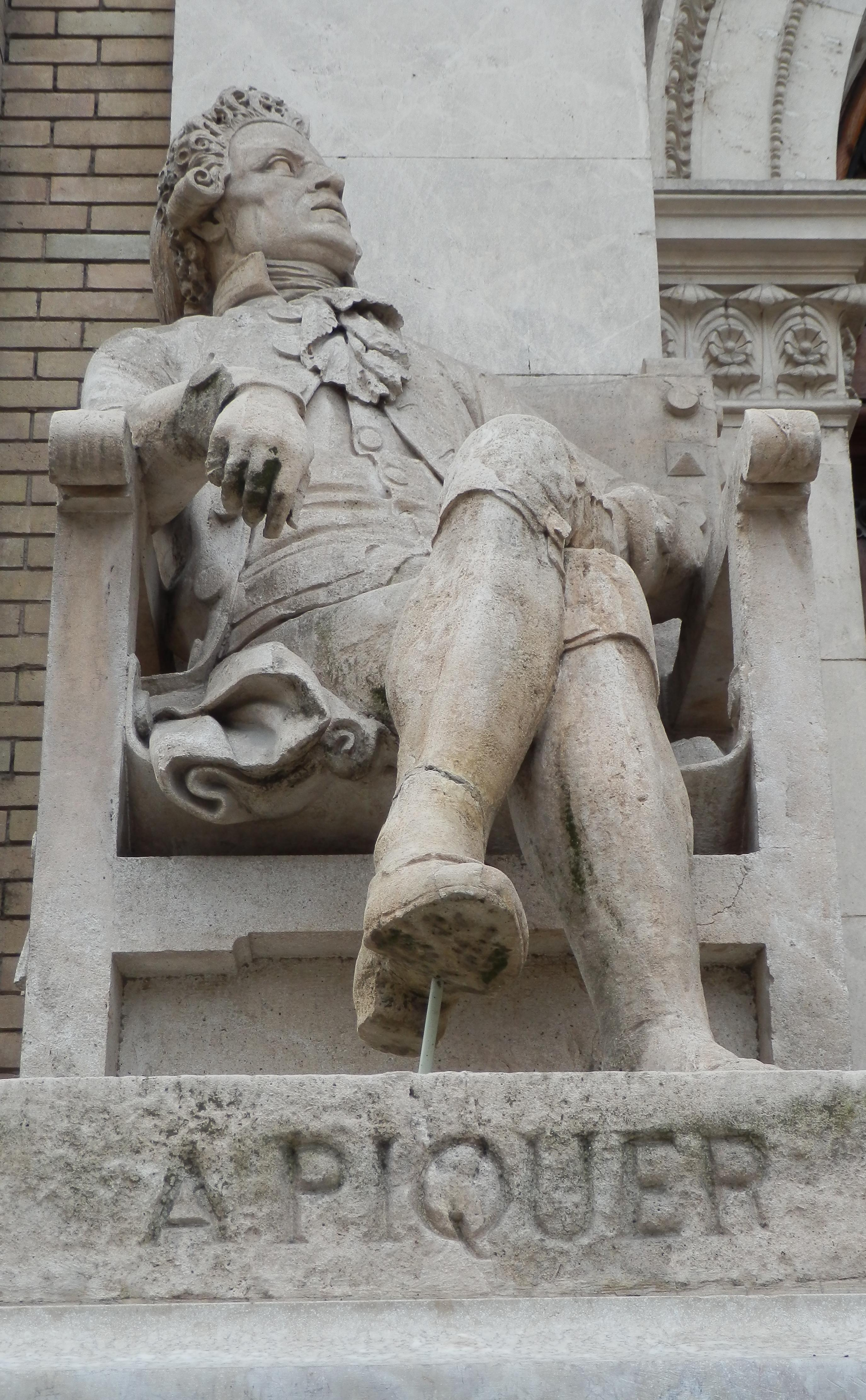 Estatua dedicada a Andrés Piquer en el Paraninfo de la Universidad de Zaragoza (Antigua Facultad de Medicina).